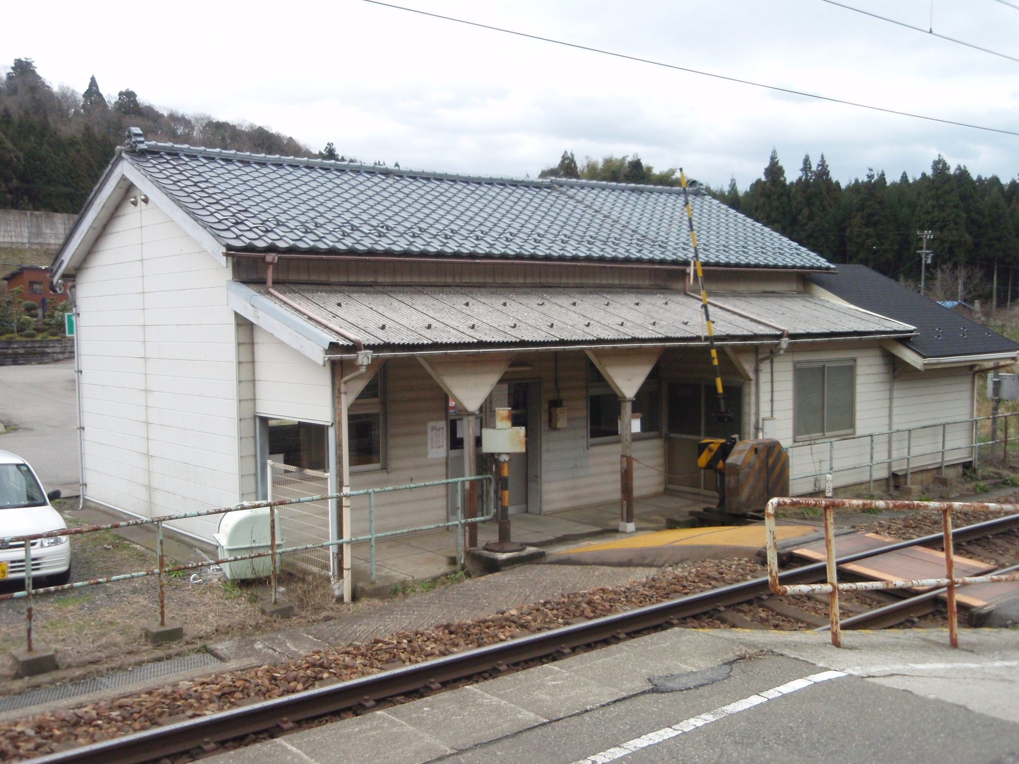 牛ノ谷駅 ホーム側より外観